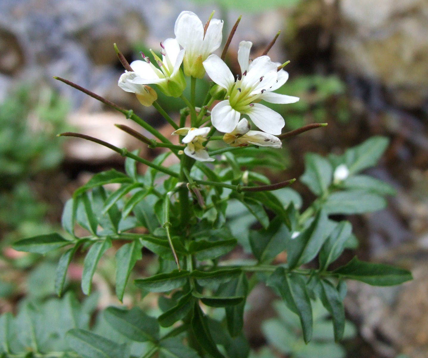 Cardamine amara (pl. rzeżucha gorzka)